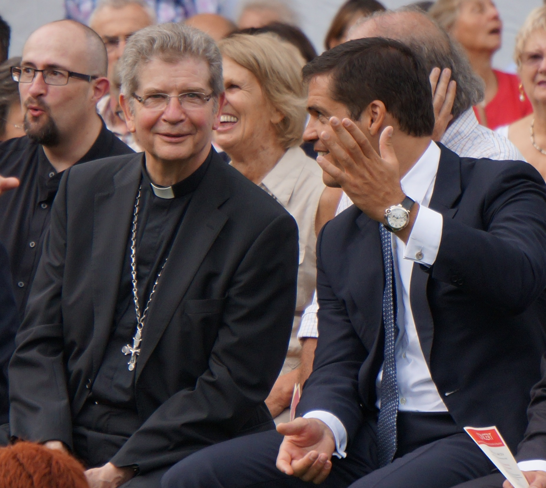 Mgr Laurent Ulrich et le prince Louis de Bourbon, héritier du trône de France.